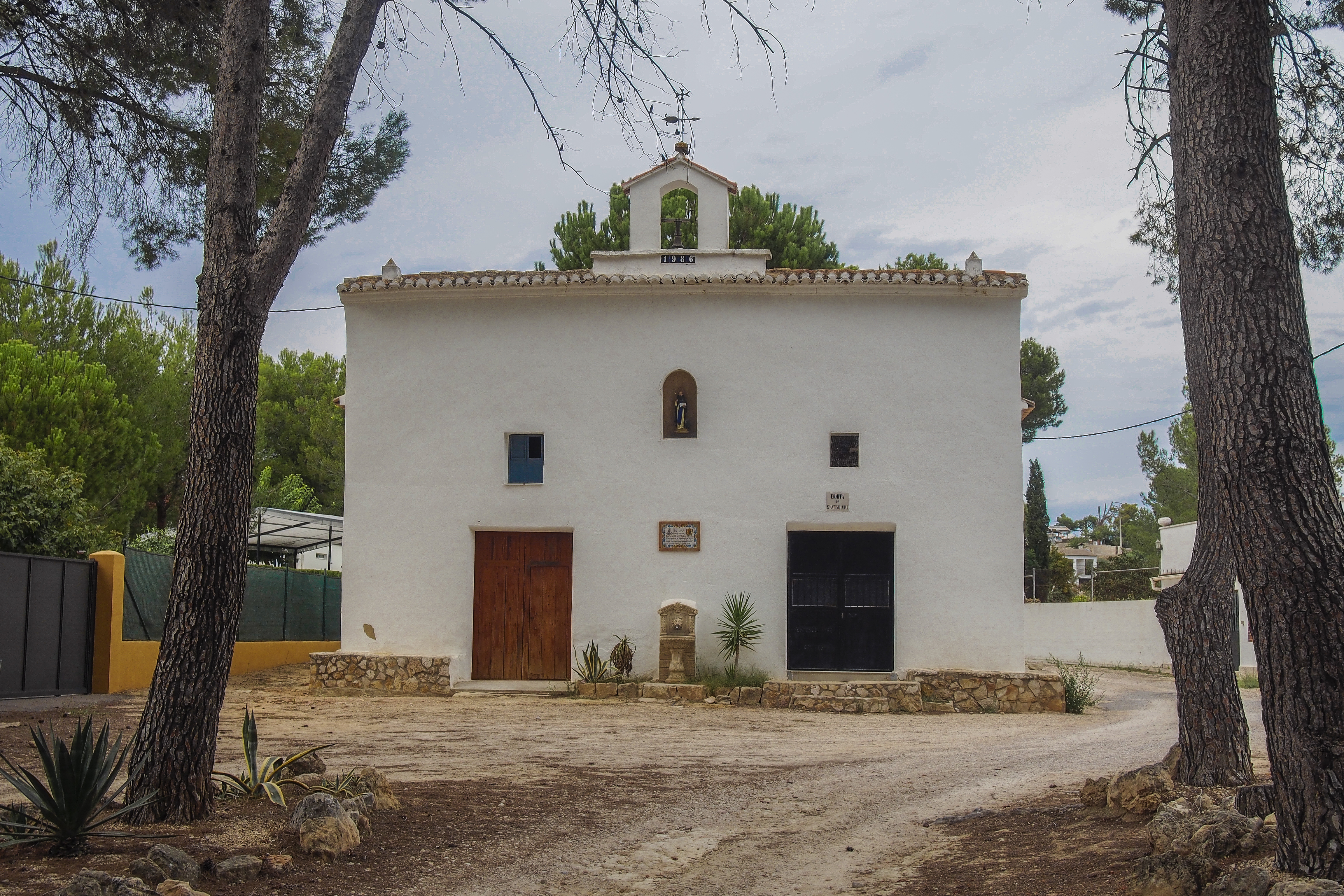 Ermita de San Antonio Abad de Benigànim 24.062-012.